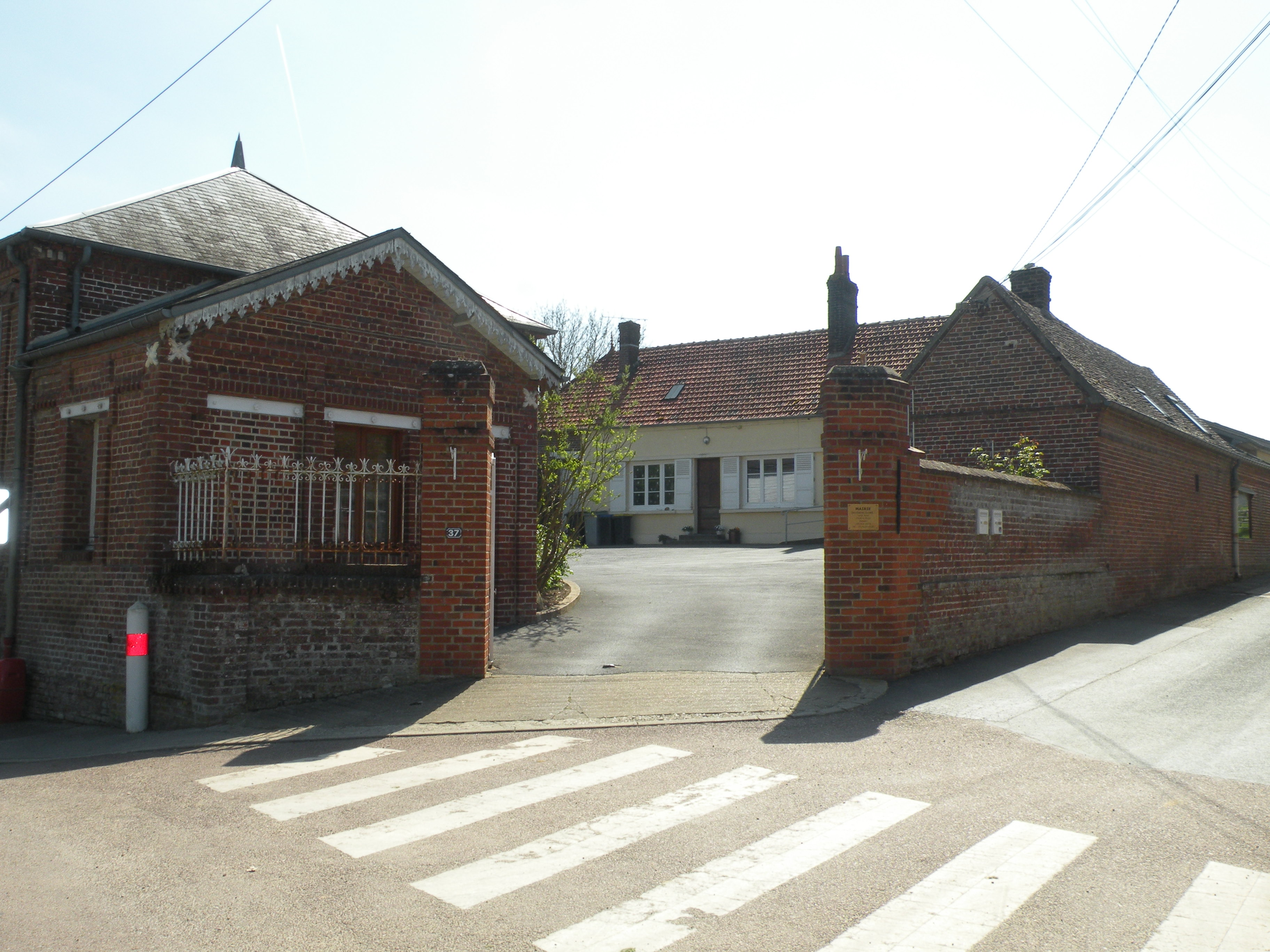 Auteuil (Oise) mairie